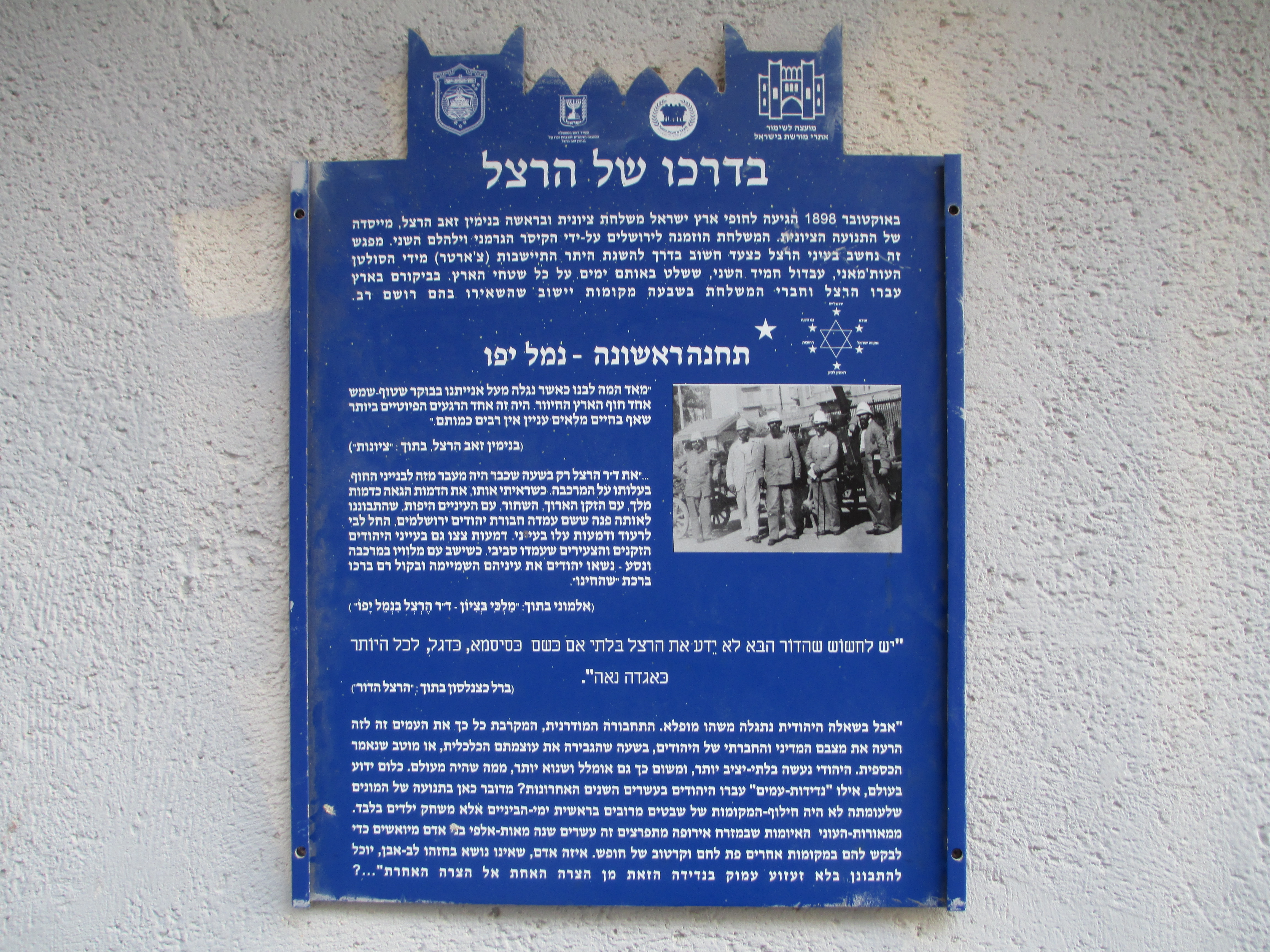 לוחית זיכרון לביקורו של הרצל בנמל יפו, תחנתו הראשונה בארץ ישראל,1898